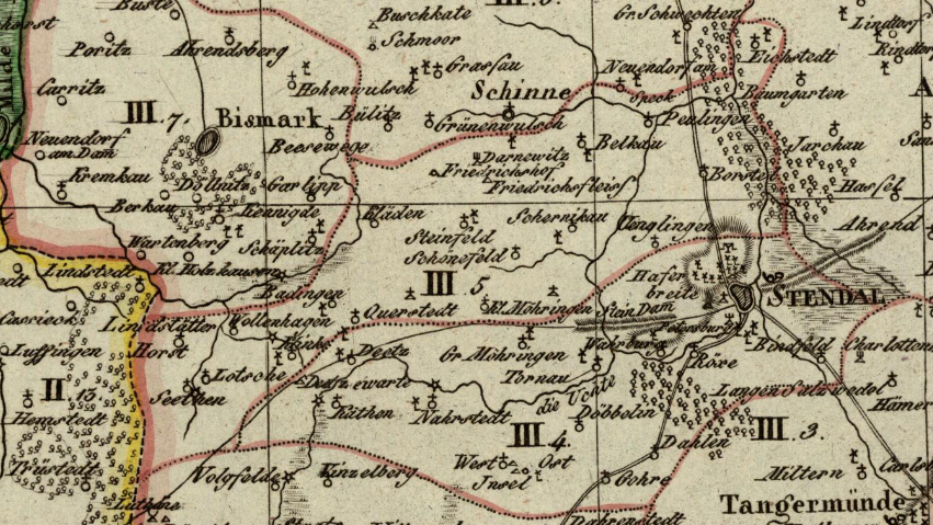 Die Kantone Pollitz und Seehausen im Distrikt Stendal, Departement der Elbe, Königreich Westphalen